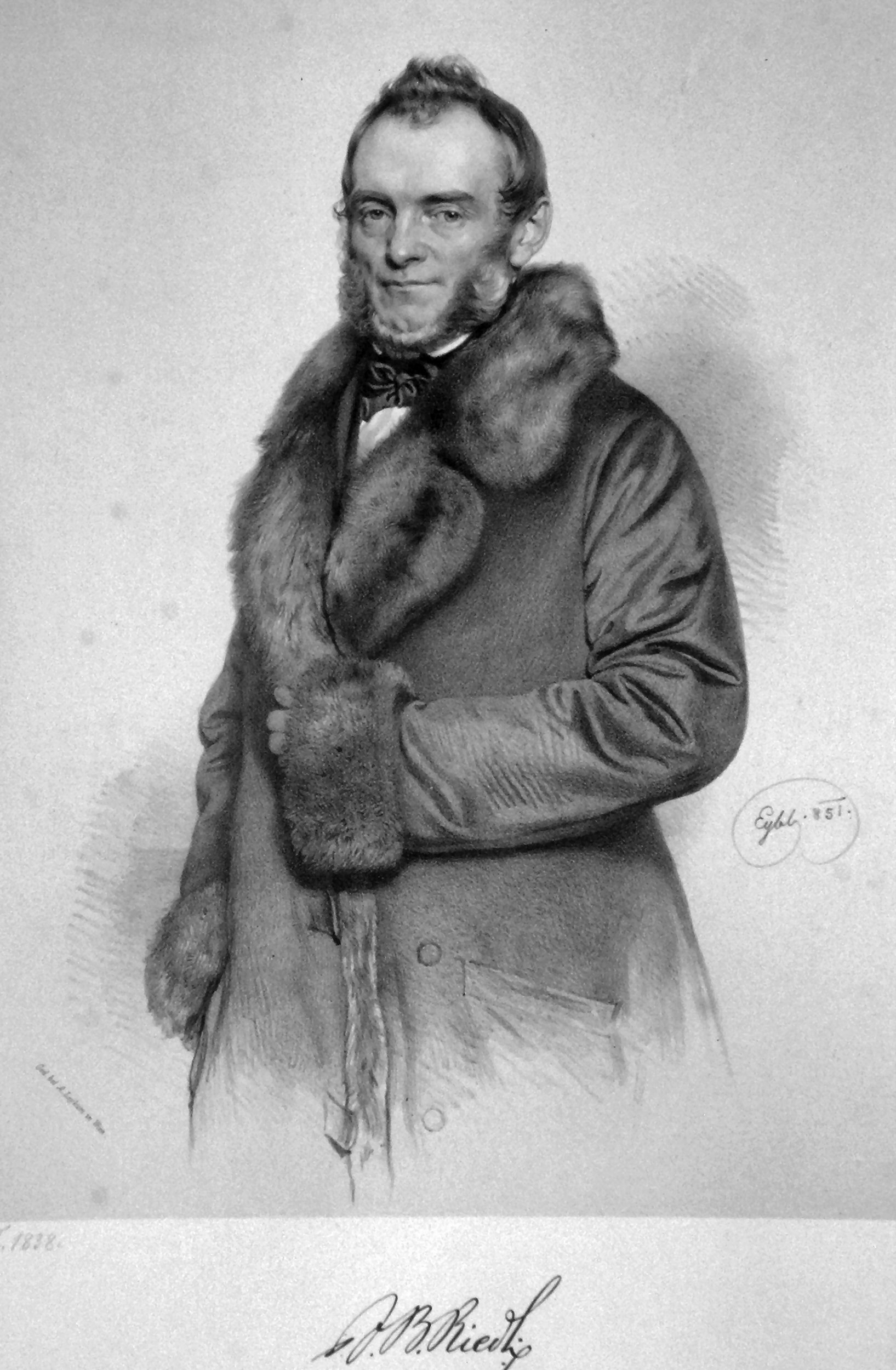 Josef Gottfried von Riedl (1803-1870), österreichischer Arzt und Psychiater. Lithographie von Franz Eybl, 1851